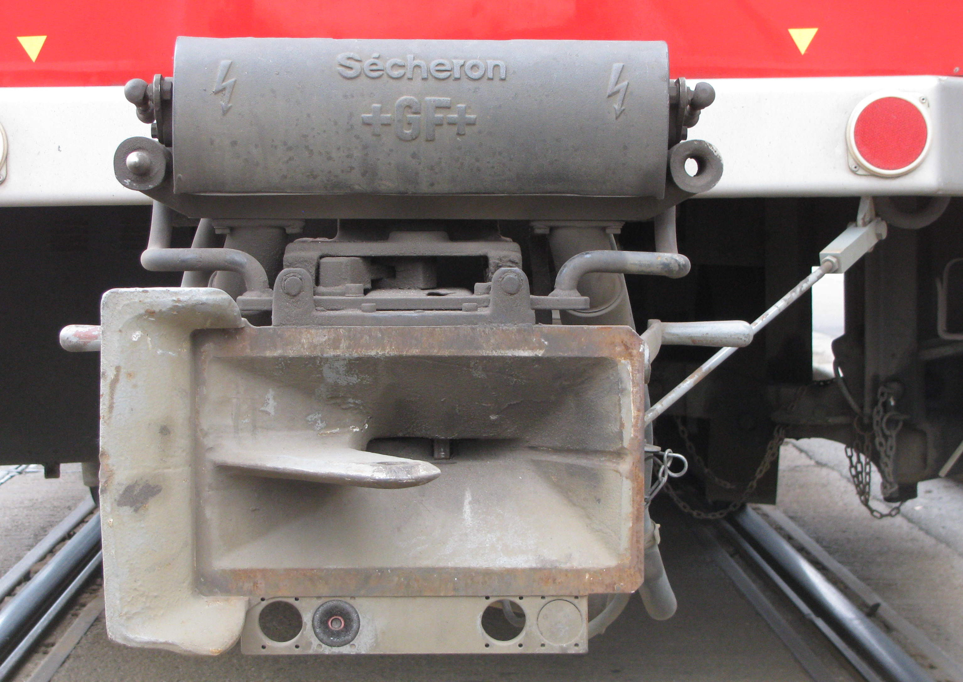 +GF+ Kupplung, prager Strassenbahnwagen vom Typ T6